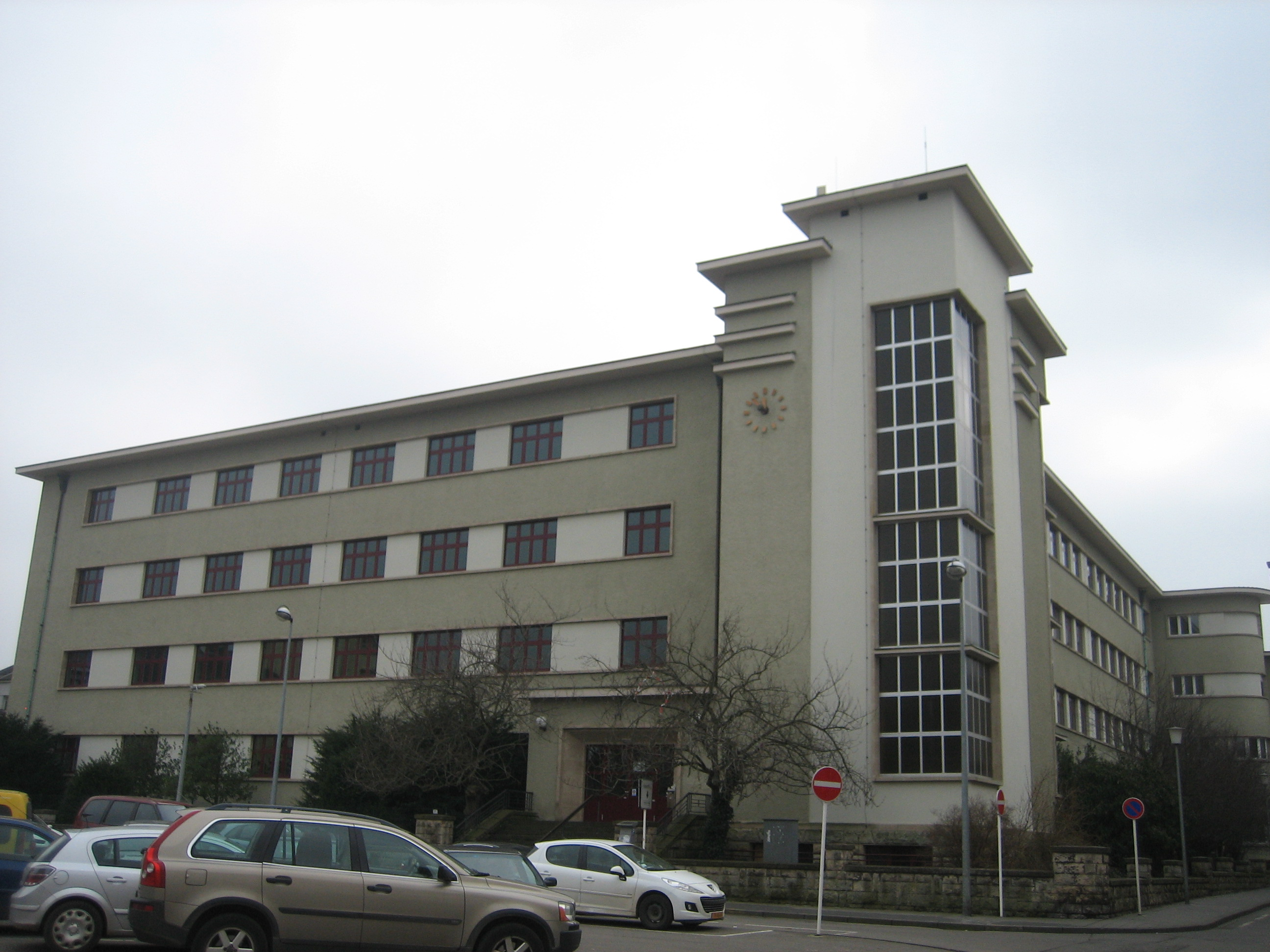 Sujet: Déi al Handwierkerschoul op der Victor-Hugo-Plaz zu Esch-Uelzecht. Kategorie:Schoulen zu Lëtzebuerg + Kategorie:Esch-Uelzecht